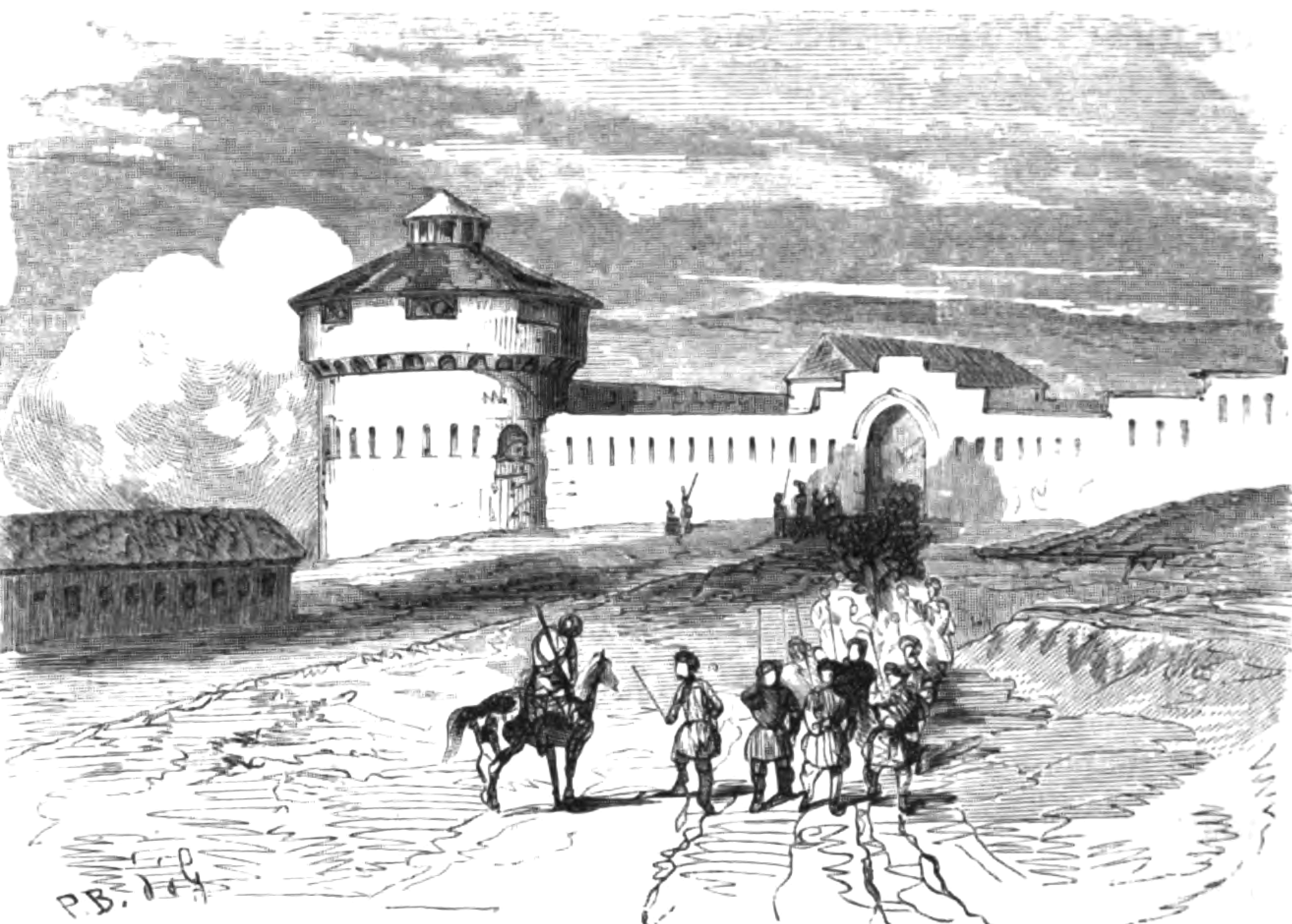 Fort de Nazaran. (Ilderkhane est une stanitza. Nazaran est une jolie forteresse, munie d'une petite tour avancée, qui domine la vallée de la Sounja, et de deux grosses tours qui défilent son enceinte crénelée.) Floriant Gille. Lettres sur le Caucase et la Crimée. 1859